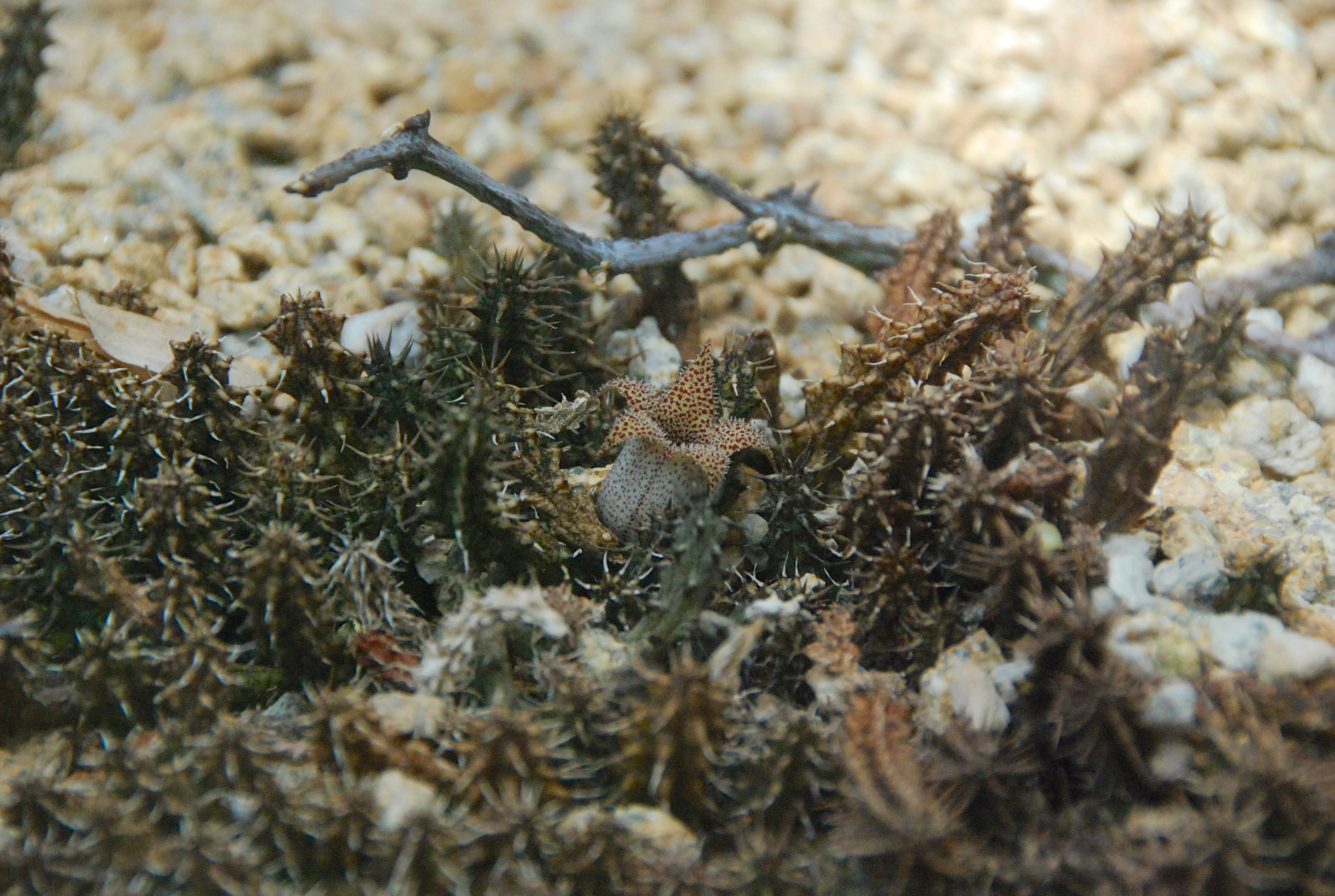 Stapelianthus decaryi au Conservatoire botanique national de Brest.